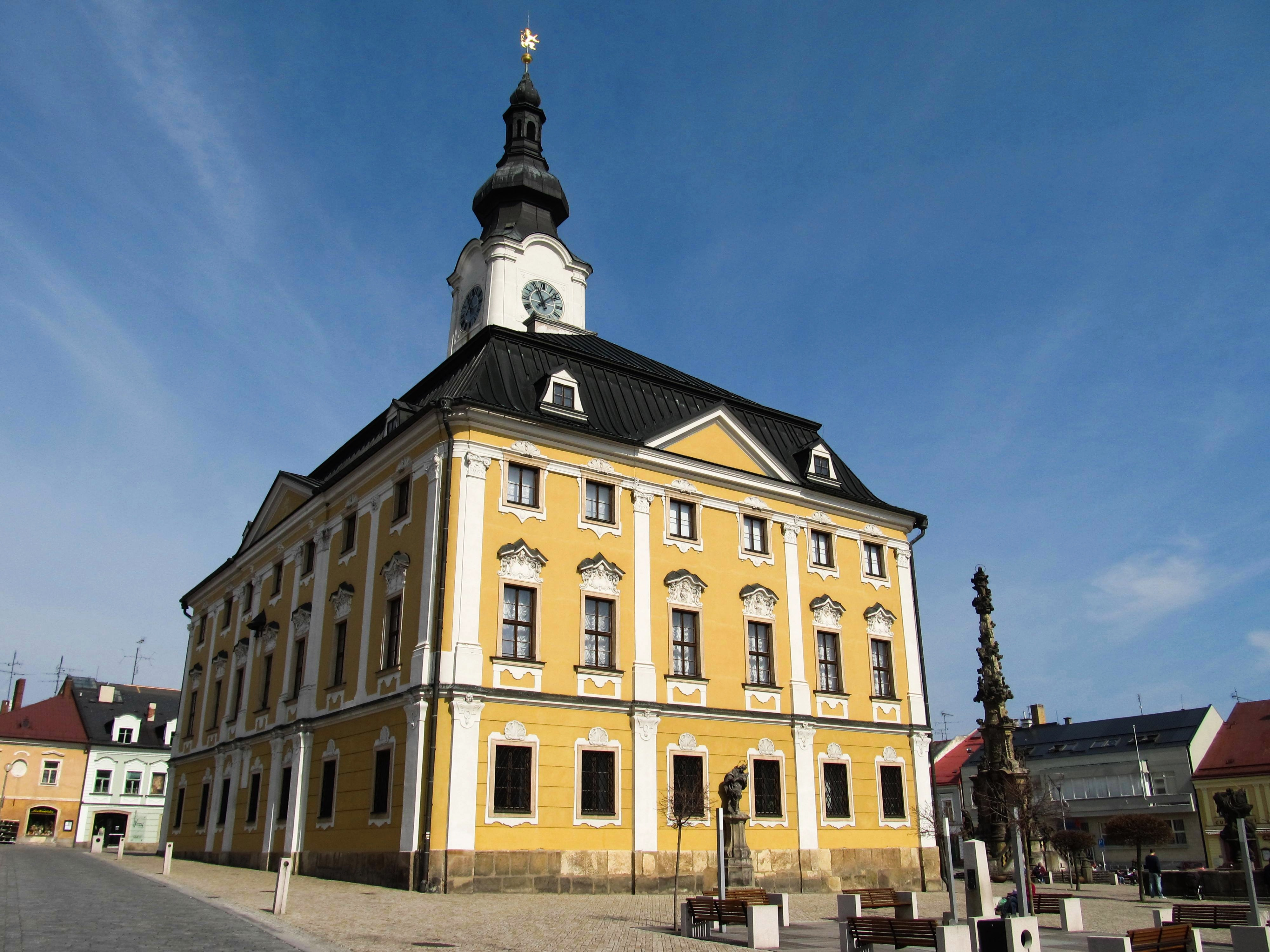 Pohled na radnici v Poličce od jihozápadu.